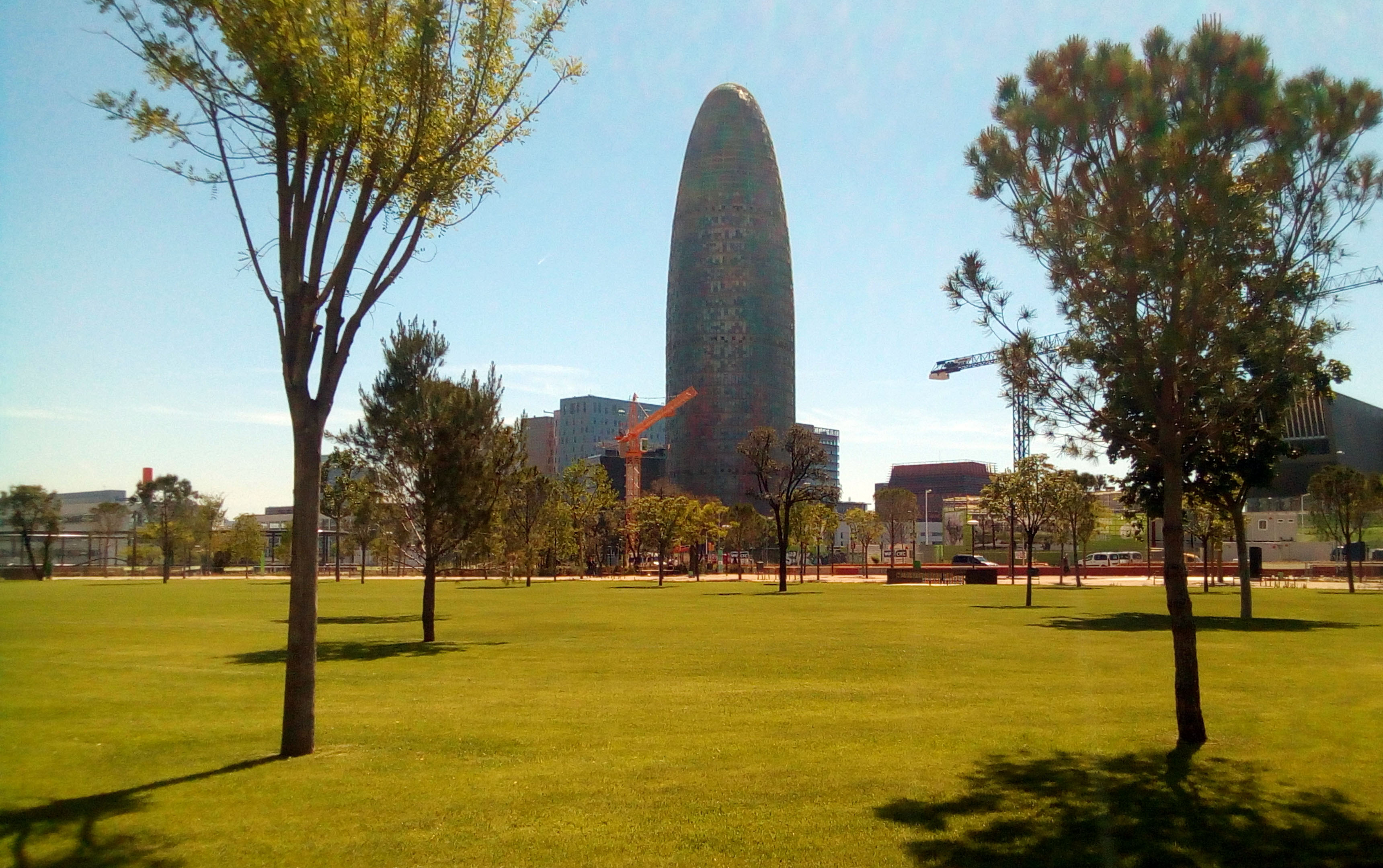 Parque de las Glorias.